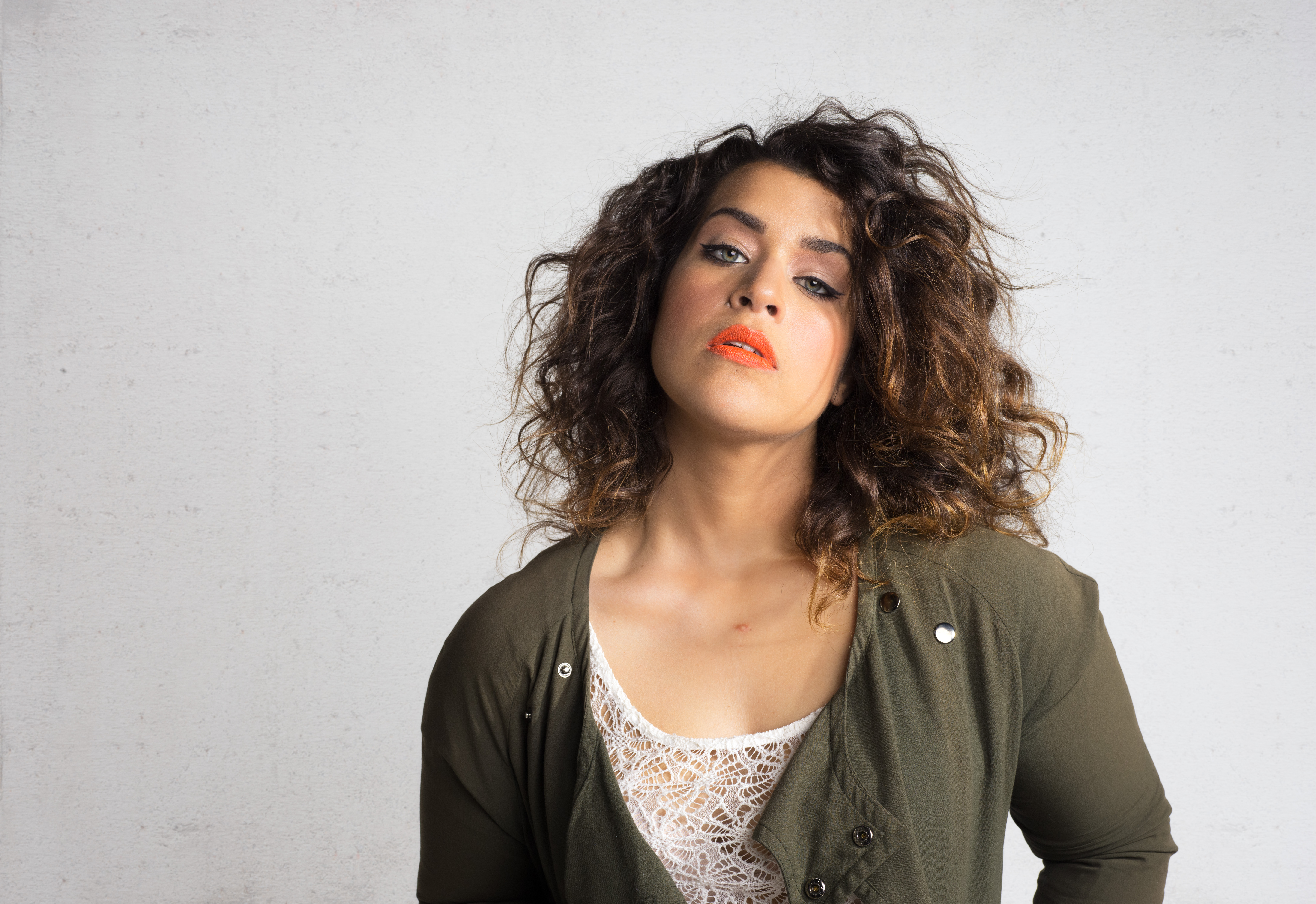 Linnea Samia Khalil pressfoto. Fotograf: Sarah Rimmö-Toure